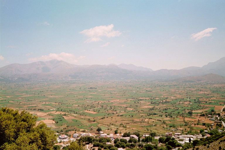 Lassithi Hochebene, Kreta Größe: 768 x 512 Originalgröße: 1536 x 1024